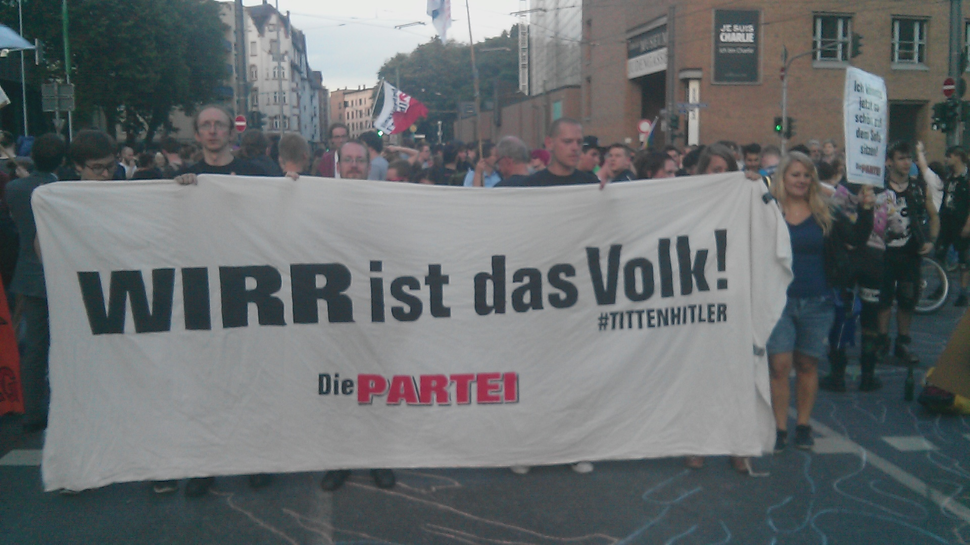 Wirr ist das Volk, Banner von "DIE PARTEI Hessen", NoFragida 11. Mai 2015, Frankfurt